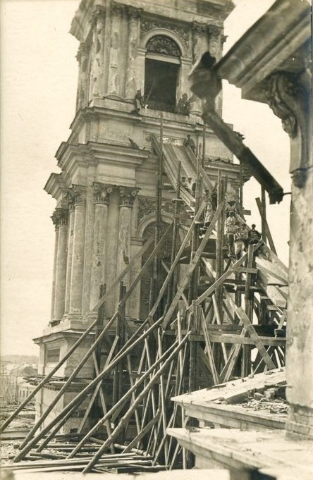 Тула